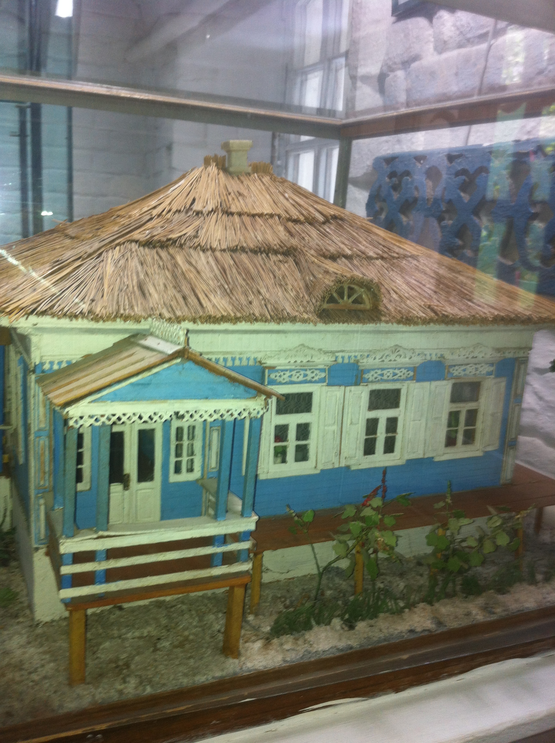 Макет казачьего куреня в музее города Старочеркасска, расположенного в крепости Ефремова.